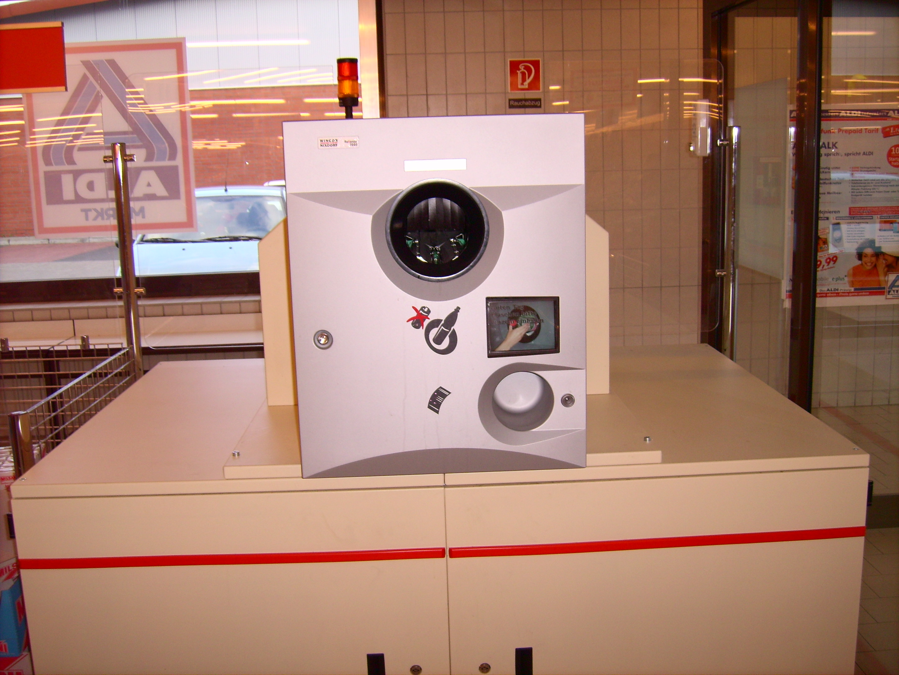 Leergutautomat "Revendo" von Wincor-Nixdorf in einem ALDI-Markt.